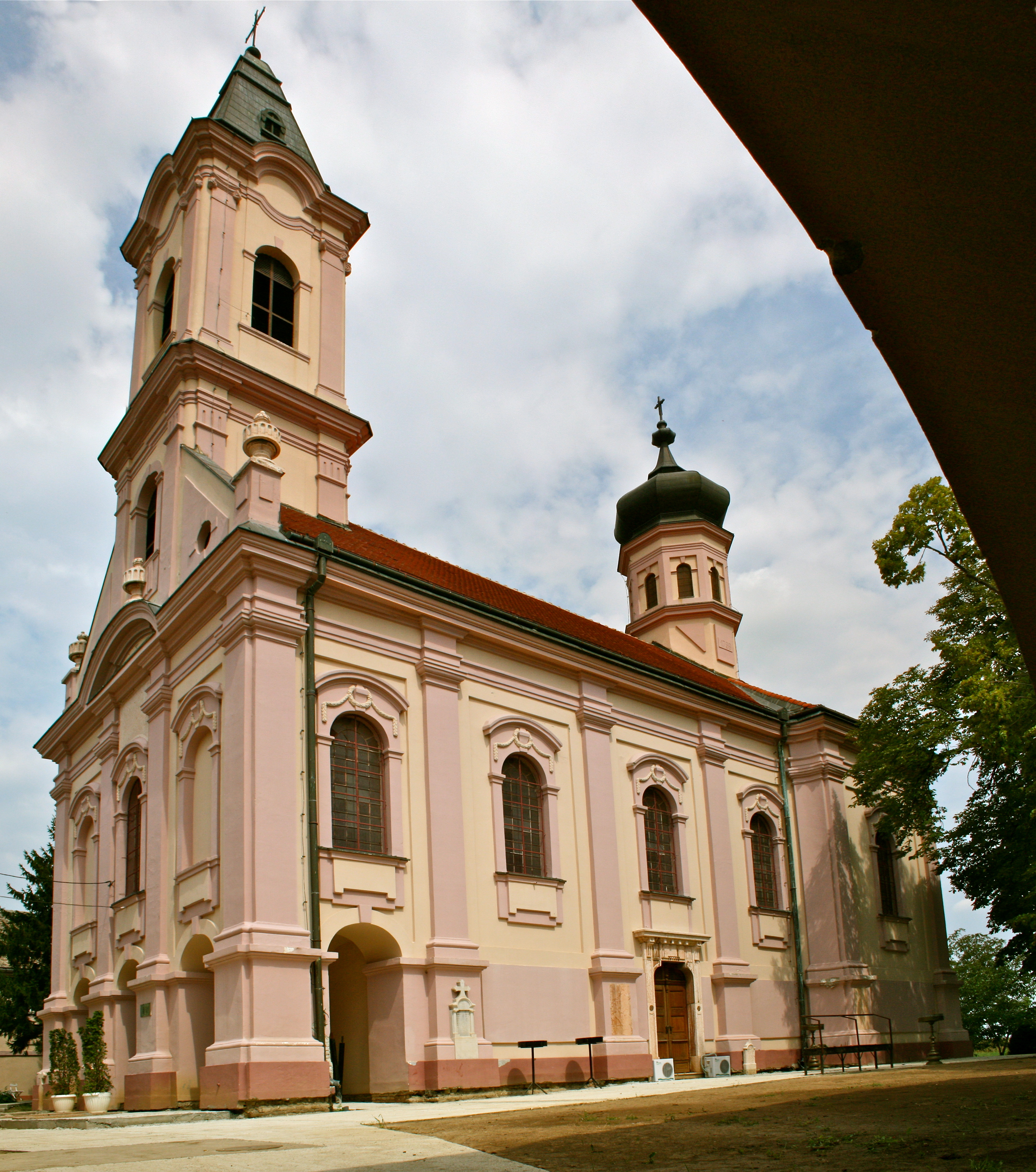 Манастир Фенек - Црква Cв. мученице Параскеве